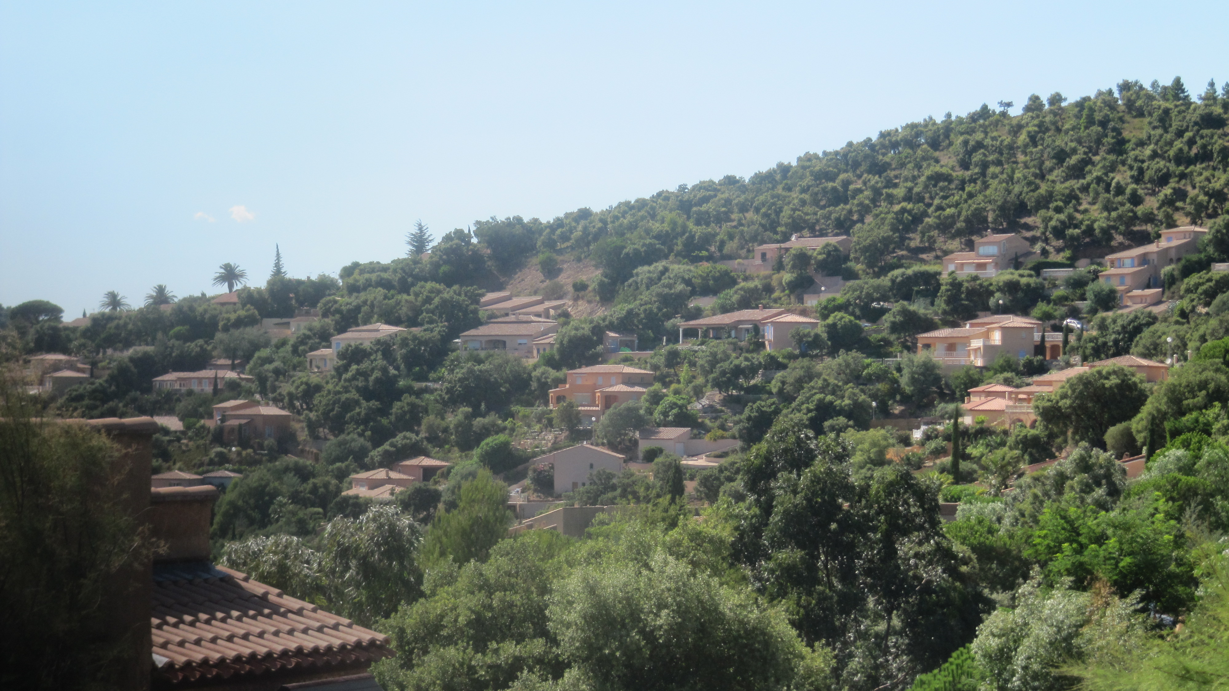 Vue d'ensemble d'une partie du village de la Crau, Var, France.